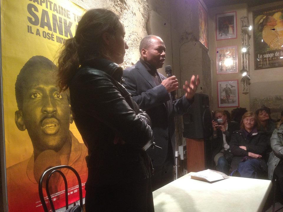 Débat suivant la projection du film Capitaine Thomas Sankara le 28 novembre 2015 à l'espace Saint-Michel à Paris avec la distributrice du film et l'historien Élisée Coulibaly.